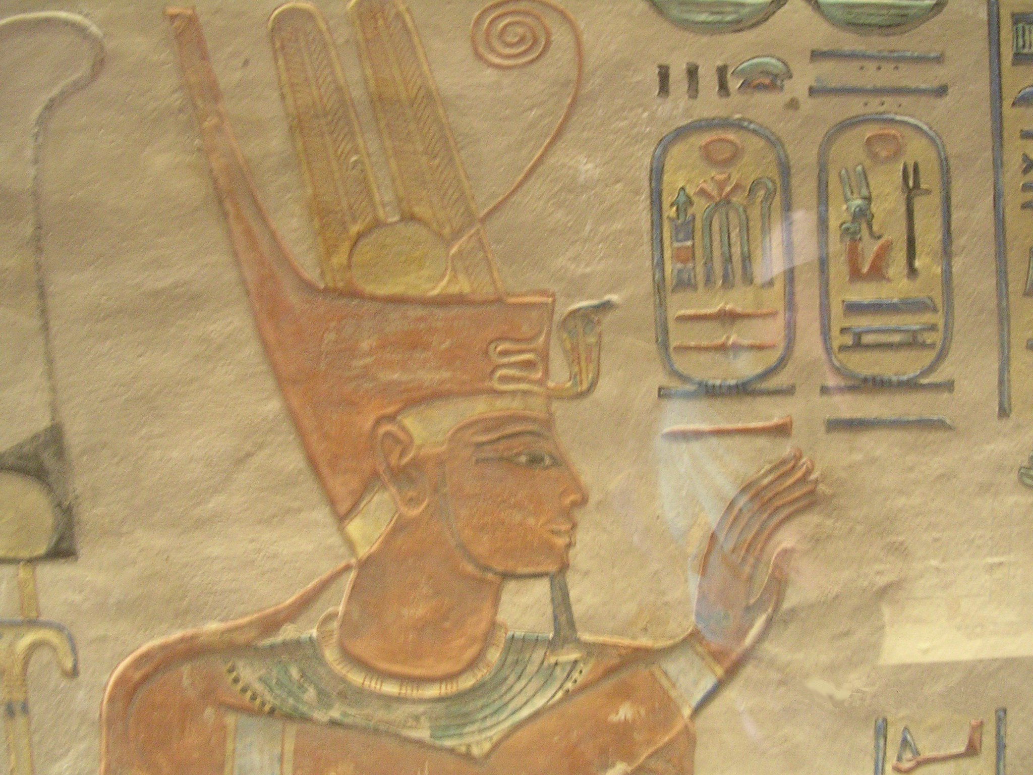 QV55, Amonherhepsef sírja (XX. dinasztia), Théba, nyugati part (Egyiptom)